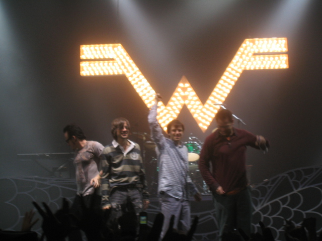 Rockband Weezer in Portland, 2005